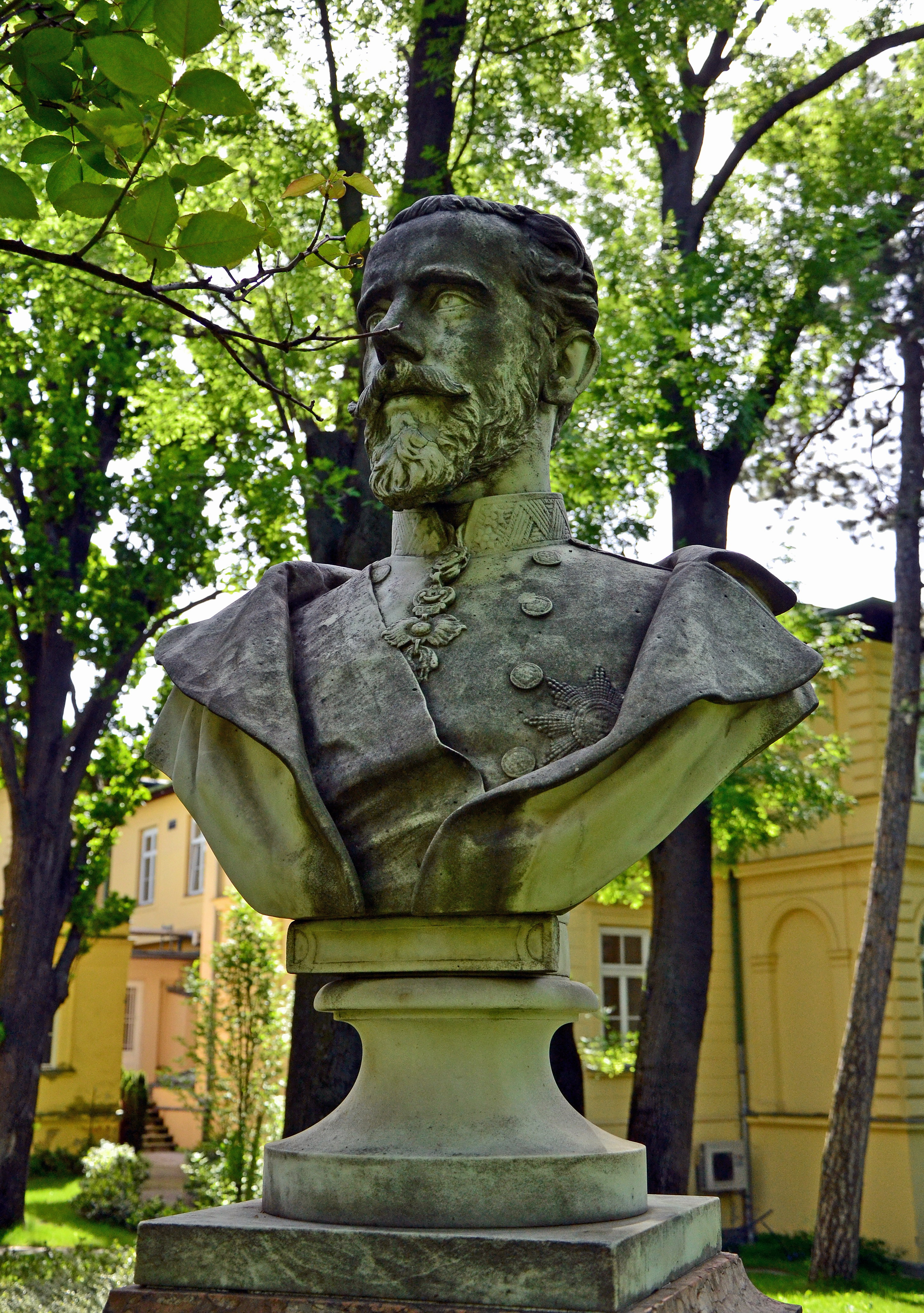 Kronprinz Rudolf - Denkmal